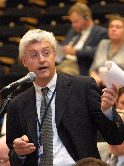 Giovanni Kessler all'Assemblea parlamentare dell'OSCE.